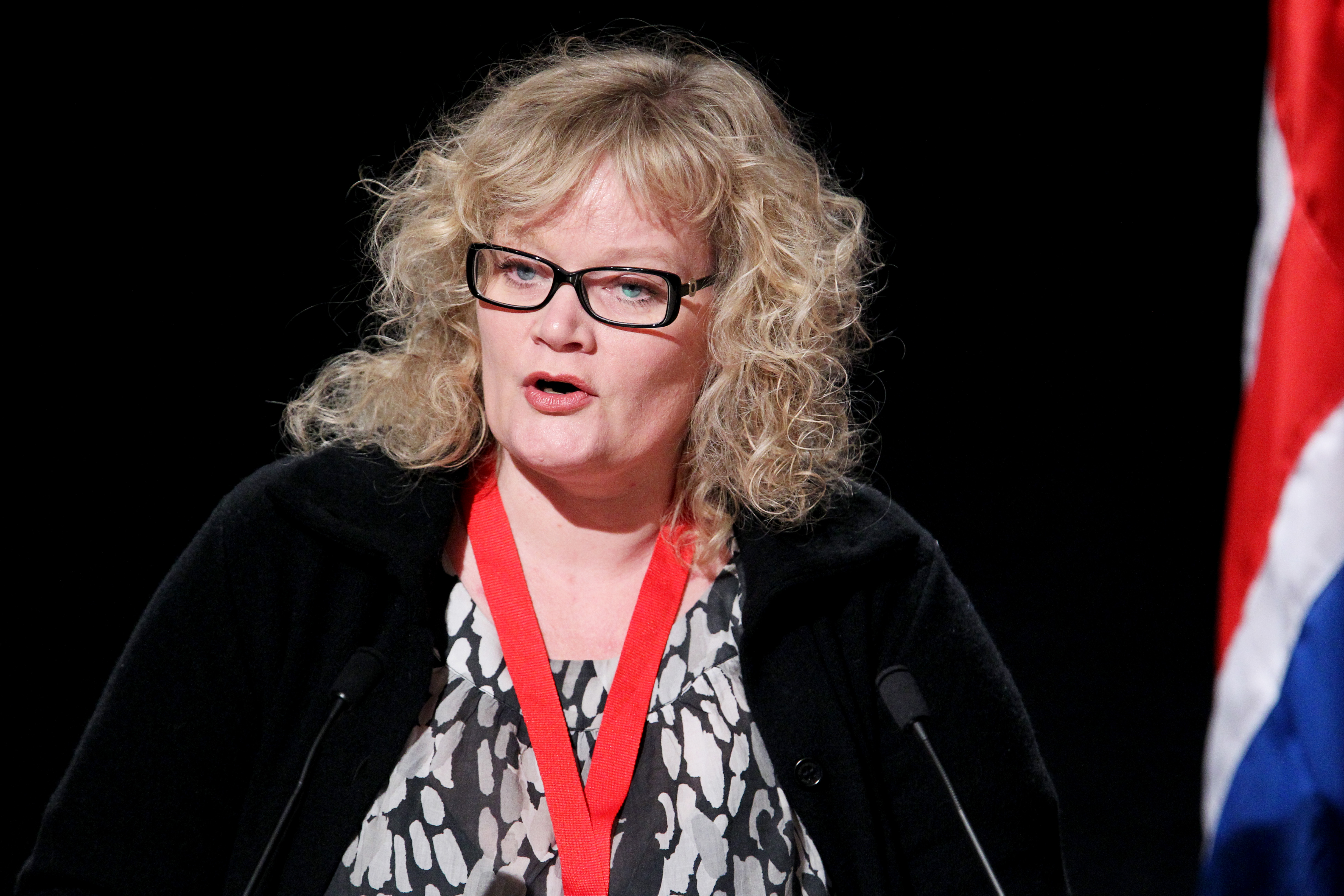 Katrin Sjögren vid Nordiska Rådets session på Island 2010-11-04.